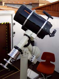 Das Celestron C14 der Sternwarte Heilbronn